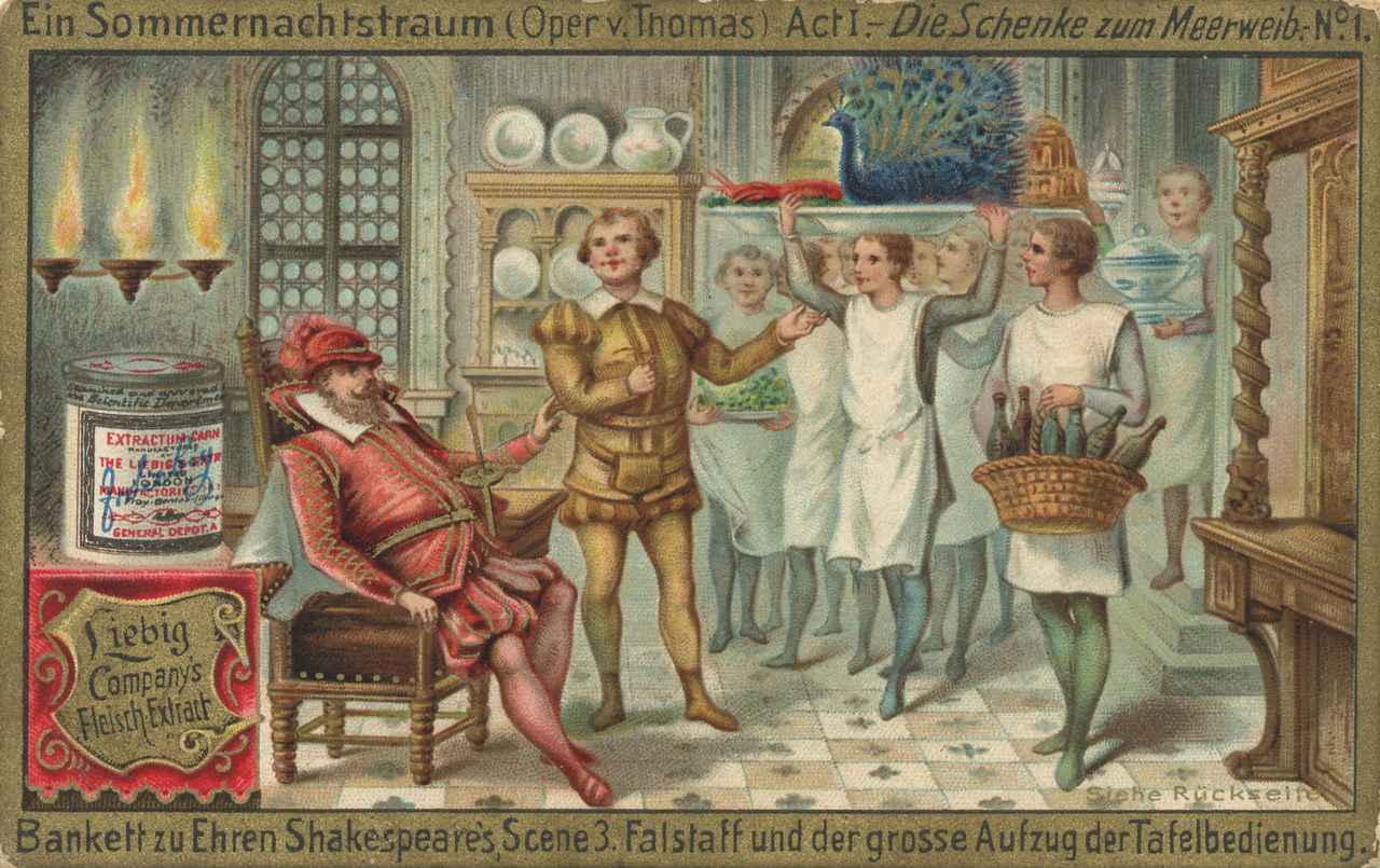 Act I. – Die Schenke zum Meerweib. No. 1 – Bankett zu Ehren Shakespeare's, Scene 3. Falstaff und der grosse Aufzug der Tafelbedienung